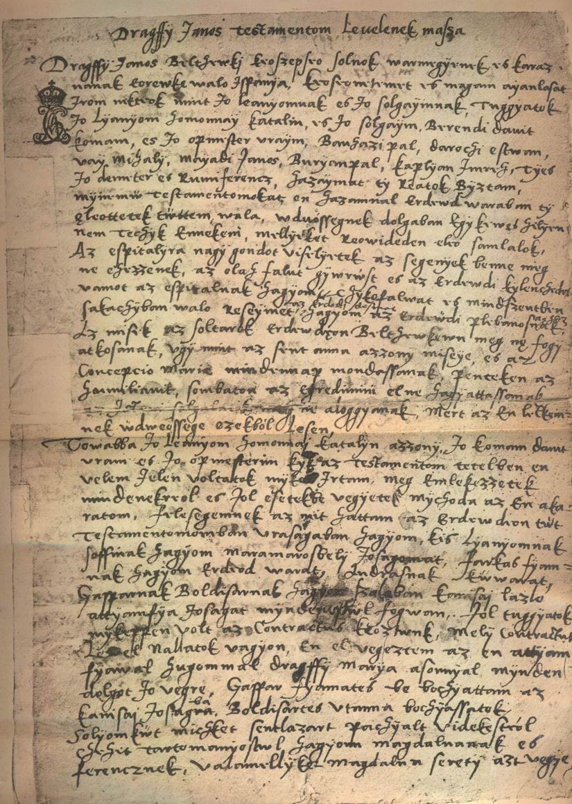 Drágffy János végrendeletének előlapja